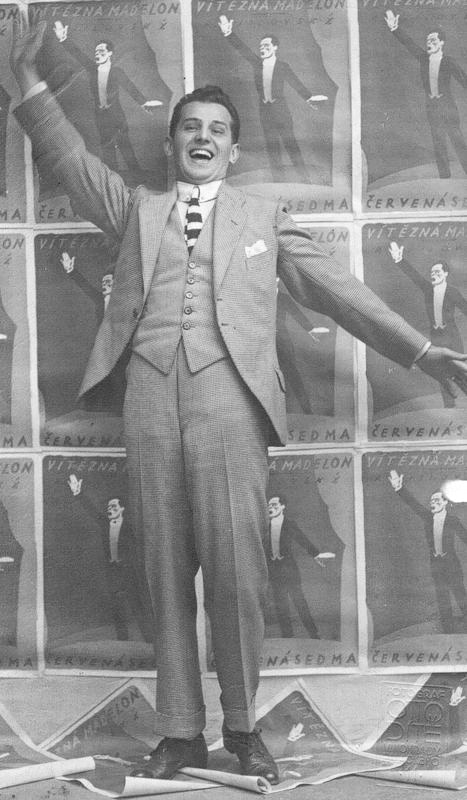 Rudolf Jílovský (1890-1954), český kabaretiér.